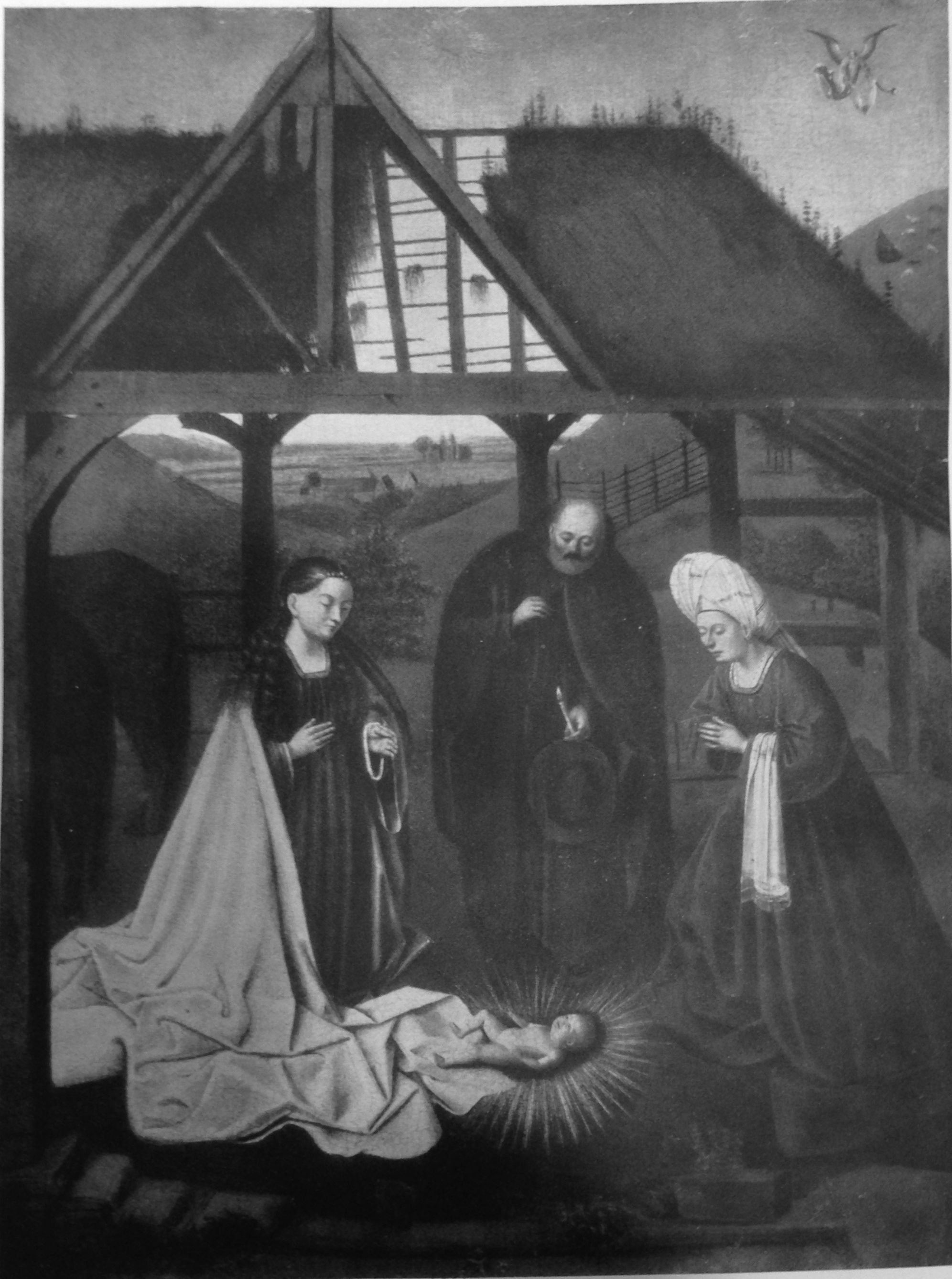 Premiere version